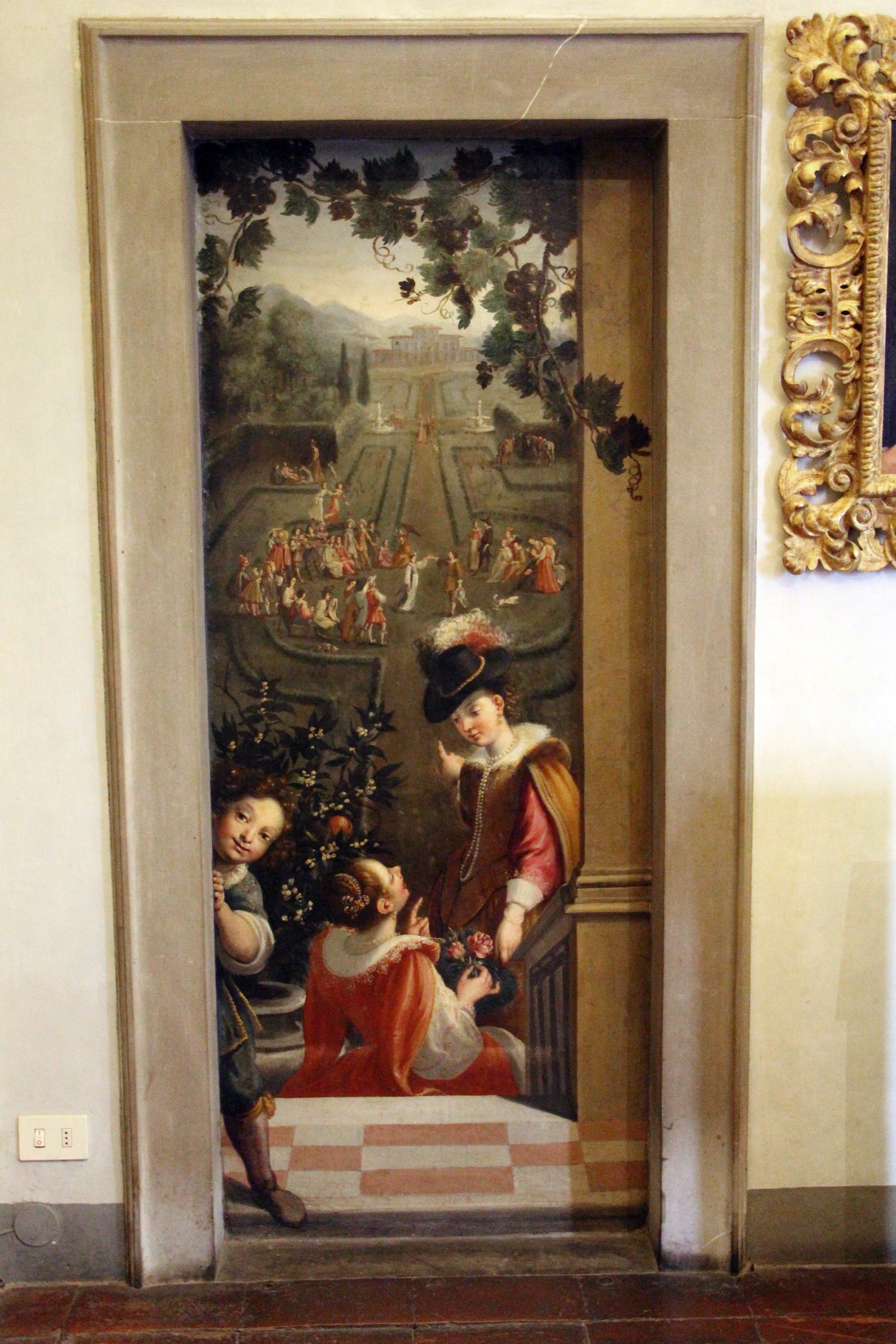 Casa Buonarroti - Camera della Notte e Dì